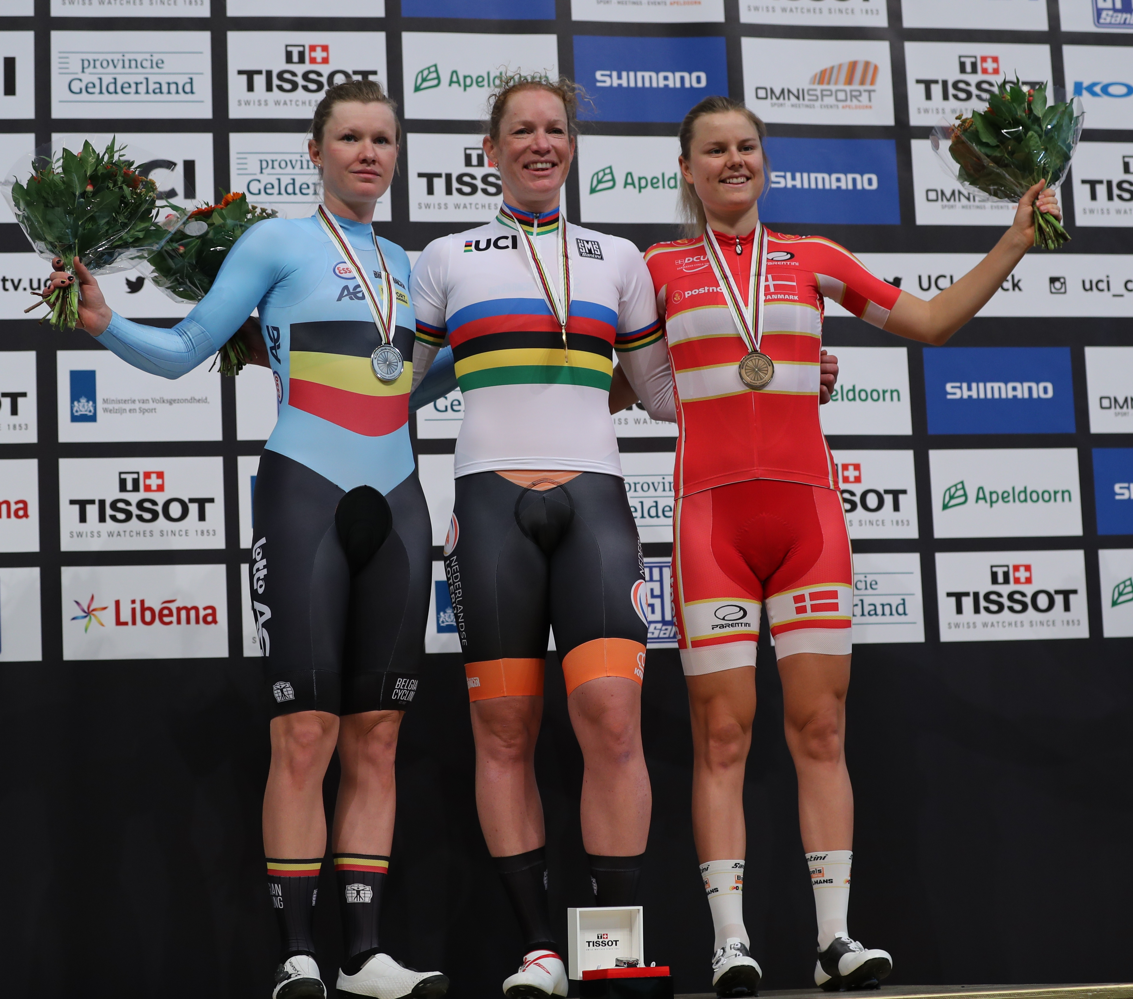 Podium Omnium (v.l.n.r.): Jolien D'hoore, Kirsten Wild, Amalie Dideriksen